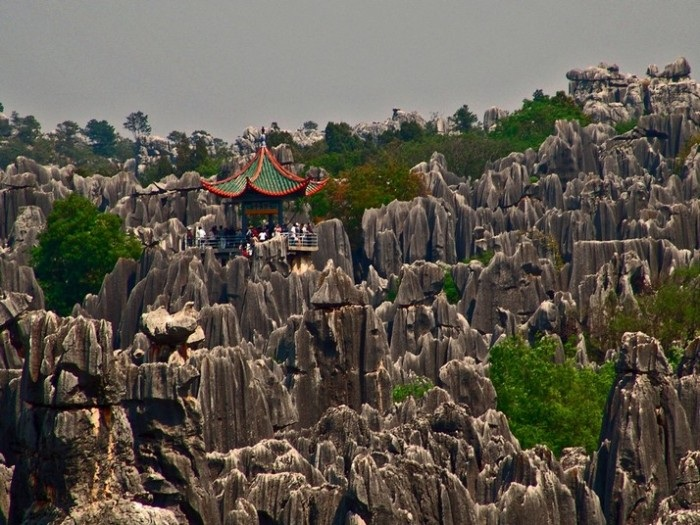 Қазақша (кирил): Қытай